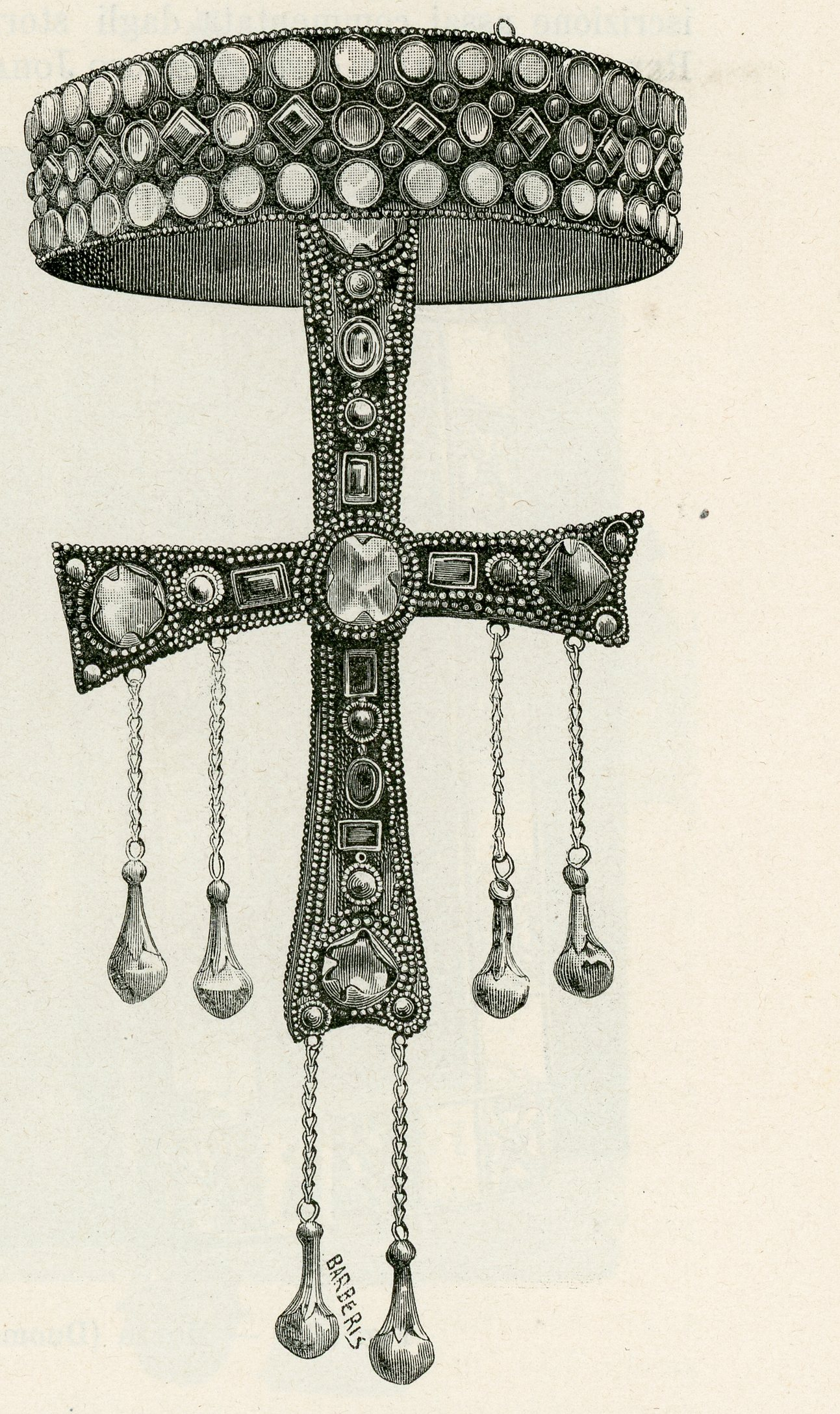 Monza (Duomo): Corona e Croce della regina Teodolinda (xilografia di Giuseppe Barberis).